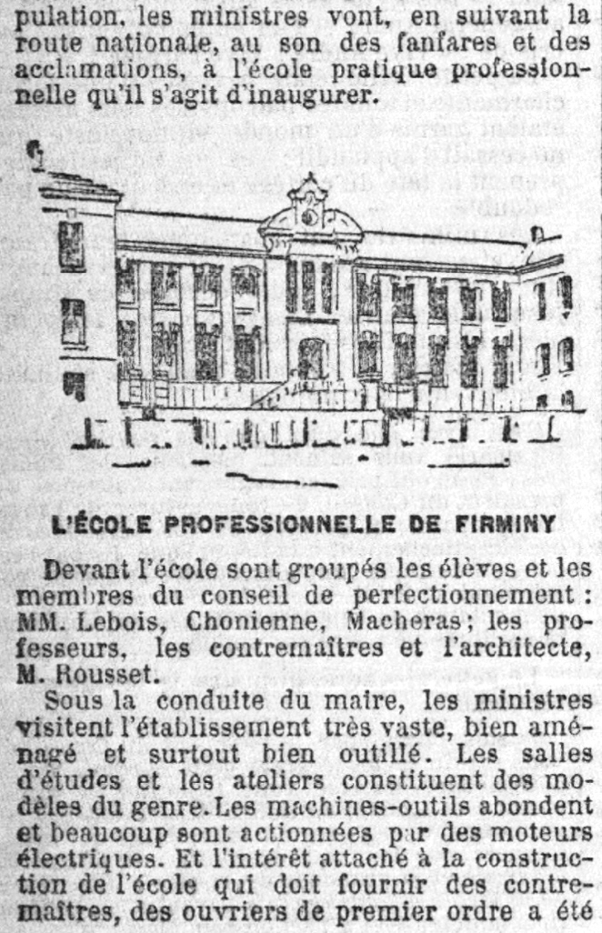 École professionnelle (ou : école pratique) de Firminy (Loire), Le Petit Parisien, 14 janvier 1902. Inauguration en présence de Millerand, ministre du Commerce, et des ministres de la Guerre et de la Marine. Claude Lebois est cité.